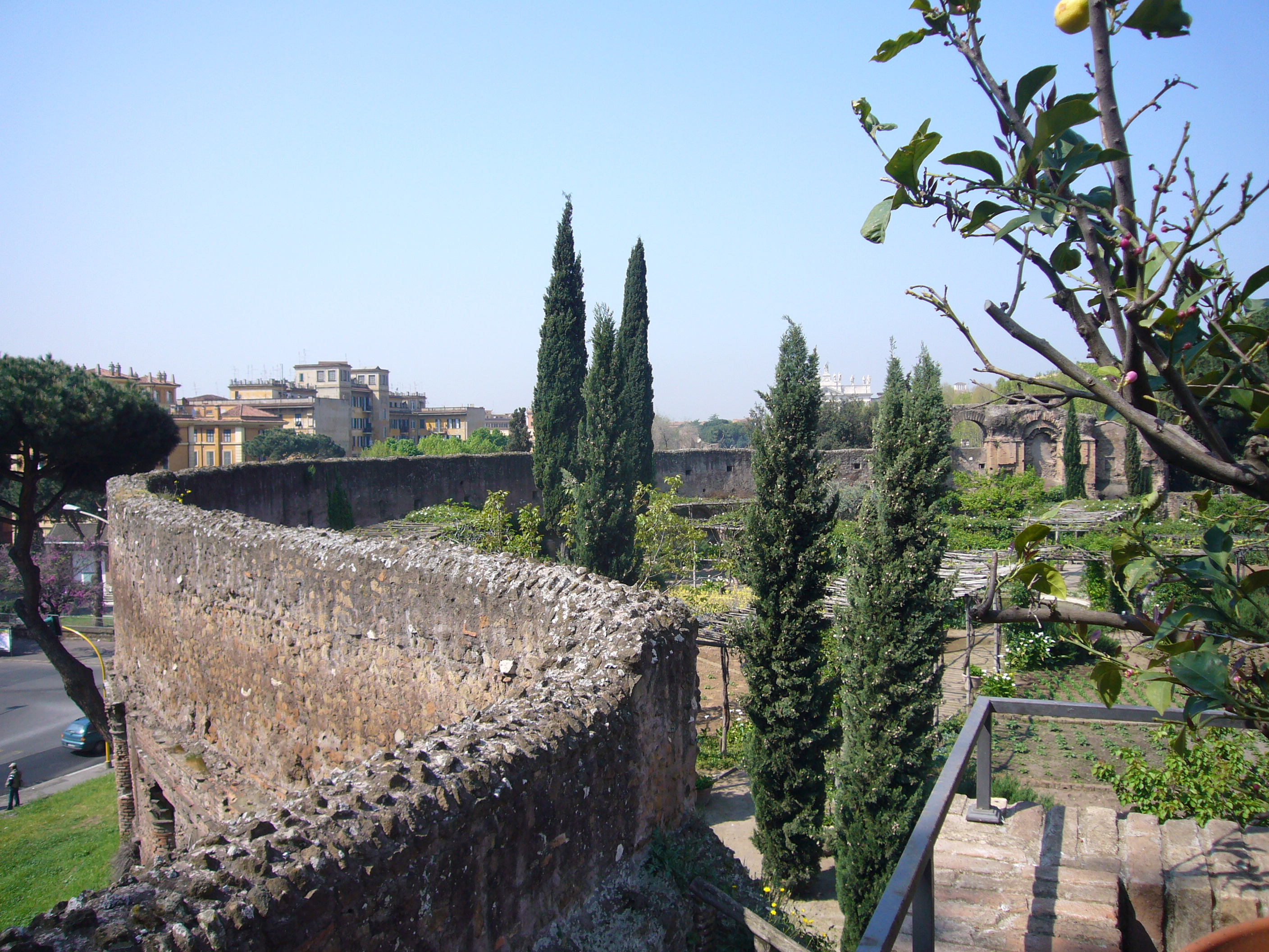 Roma, orto monastico di Santa Croce in Gerusalemme dentro l'Anfiteatro Castrense: la curva dell'anfiteatro. Sulla destra i resti del secondo piano.